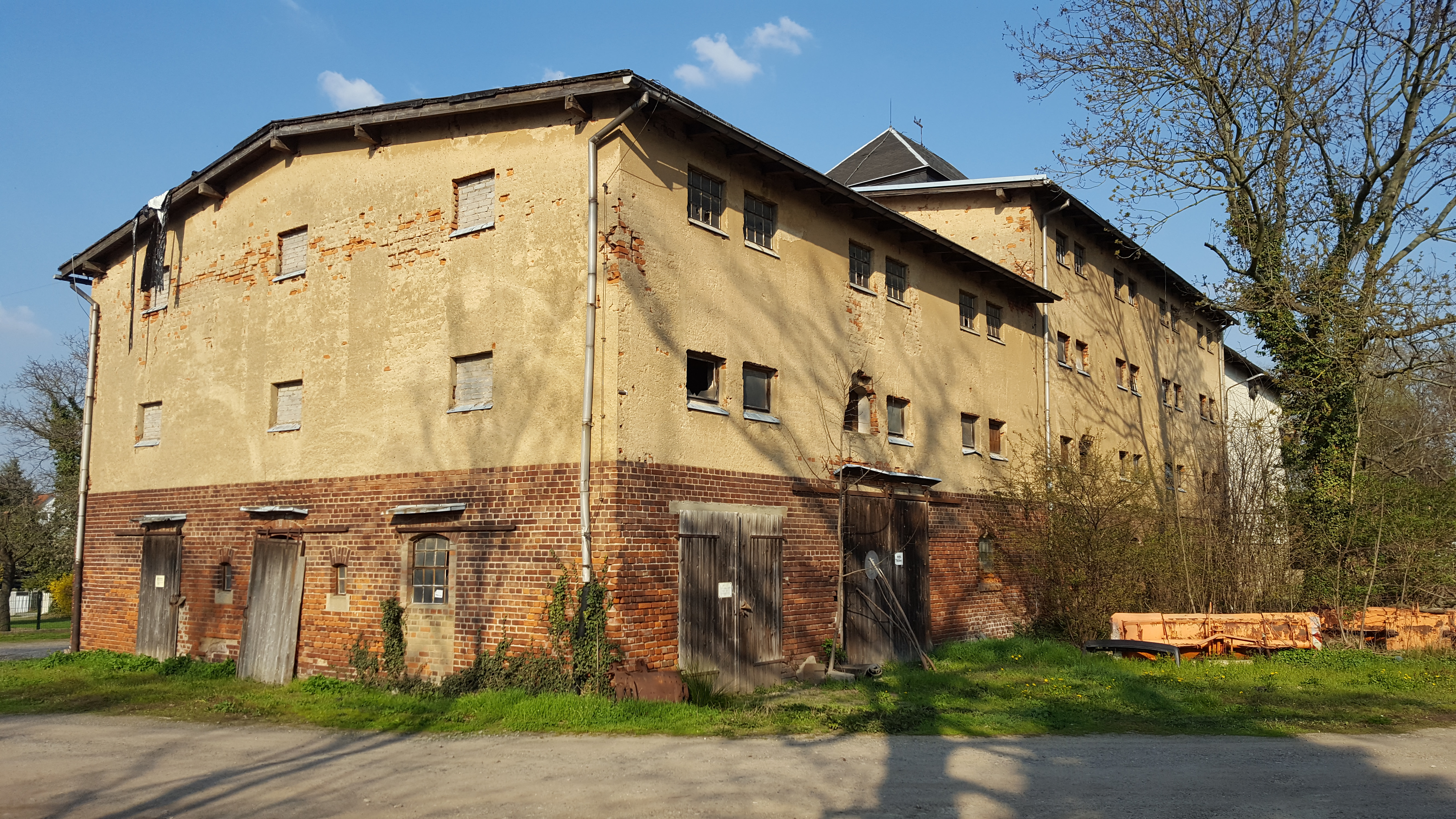 Das Herrenhaus des ehemaligen Ritterguts Burkartshain mit dem Torhaus. Im Schlußstein ist das Monogramm HJM für Hans Jakob Mettler mit der Jahreszahl 1838 dem Erbauer des HH und AJ für Alfred Jakob, welcher 1912 das HH umbauen liess.